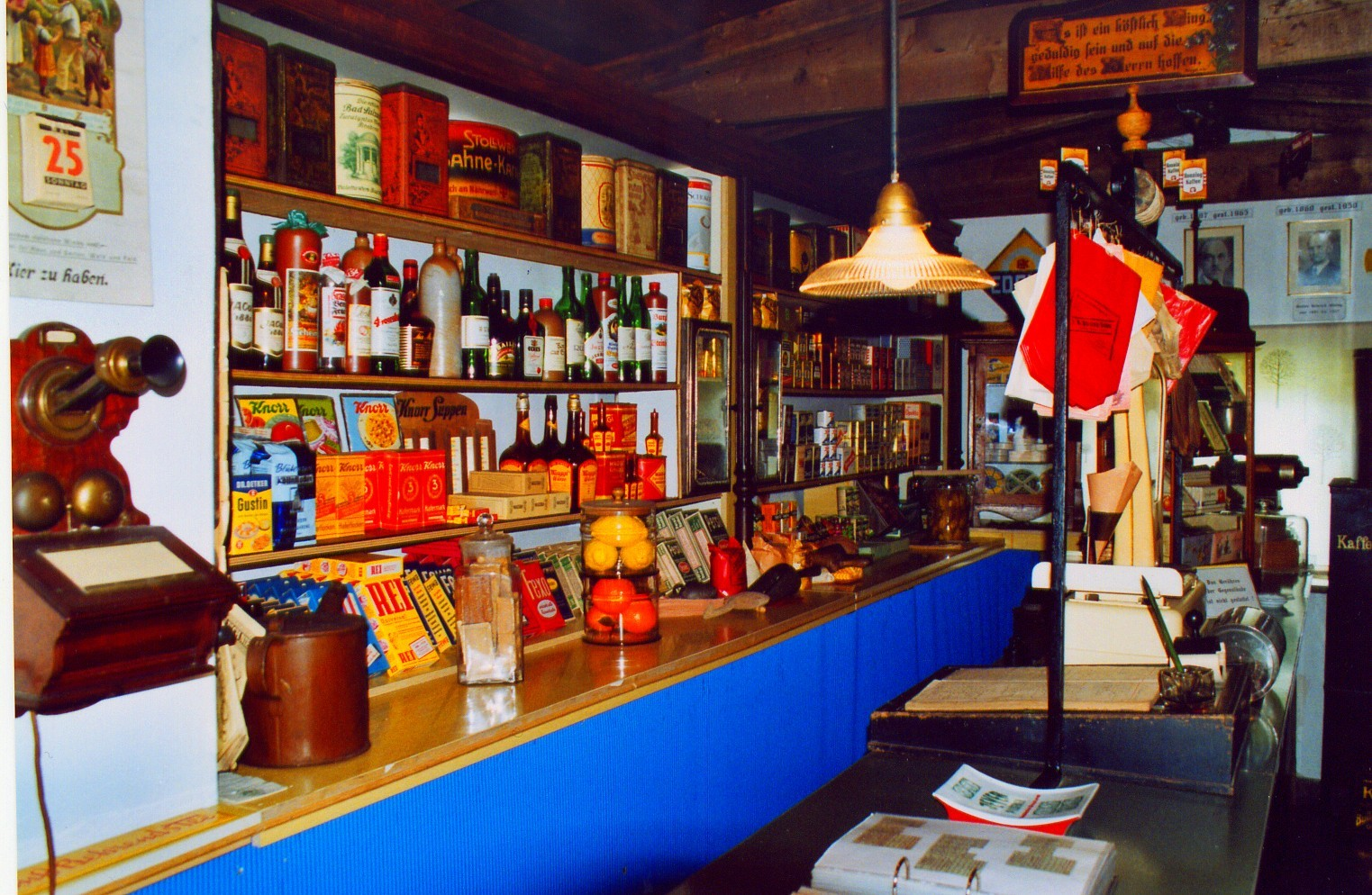 Historisches Kaufhaus AbbehausenMuseums-Ladenzeile im Obergeschoss